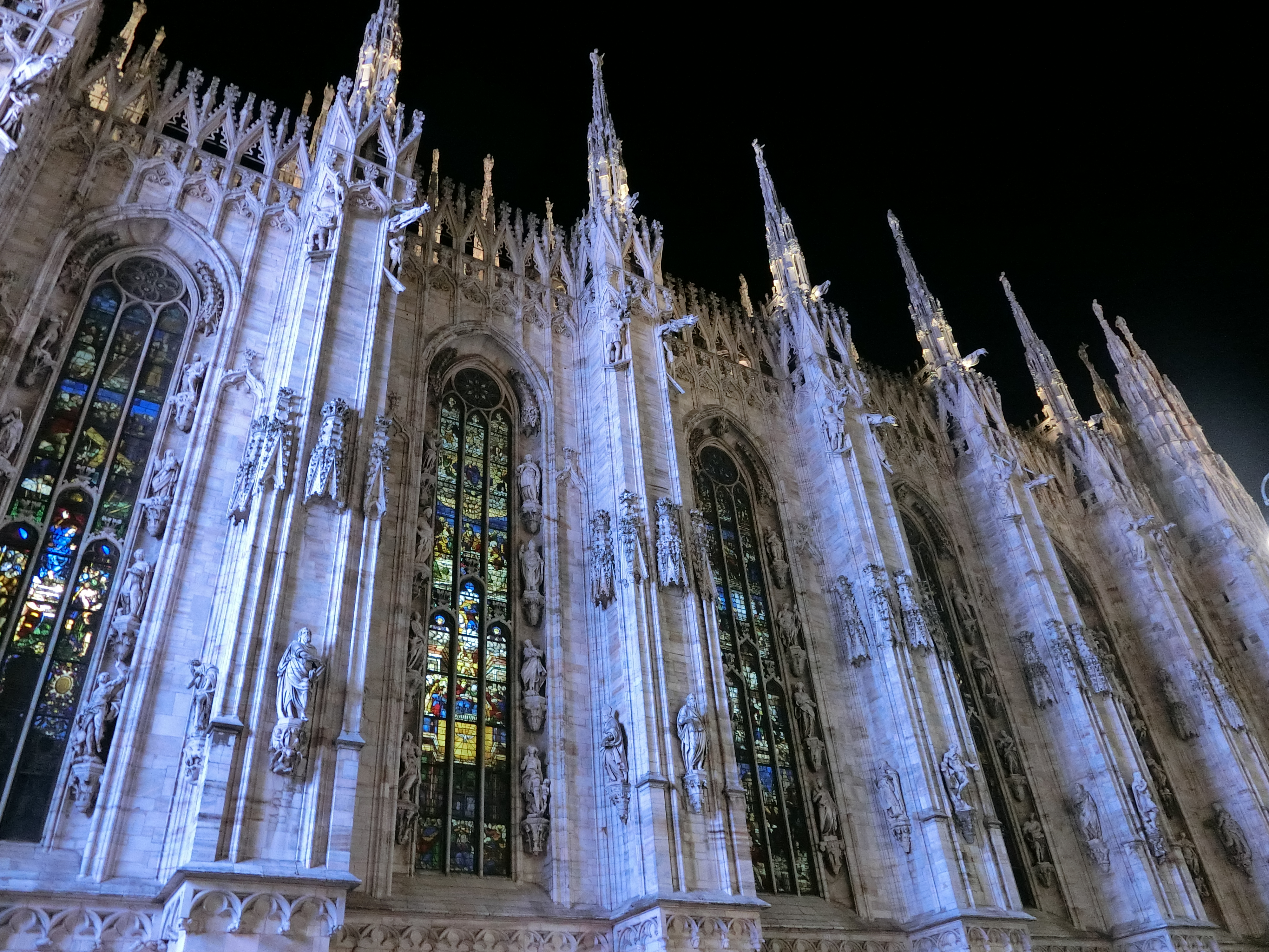 中が明るいと綺麗に見える